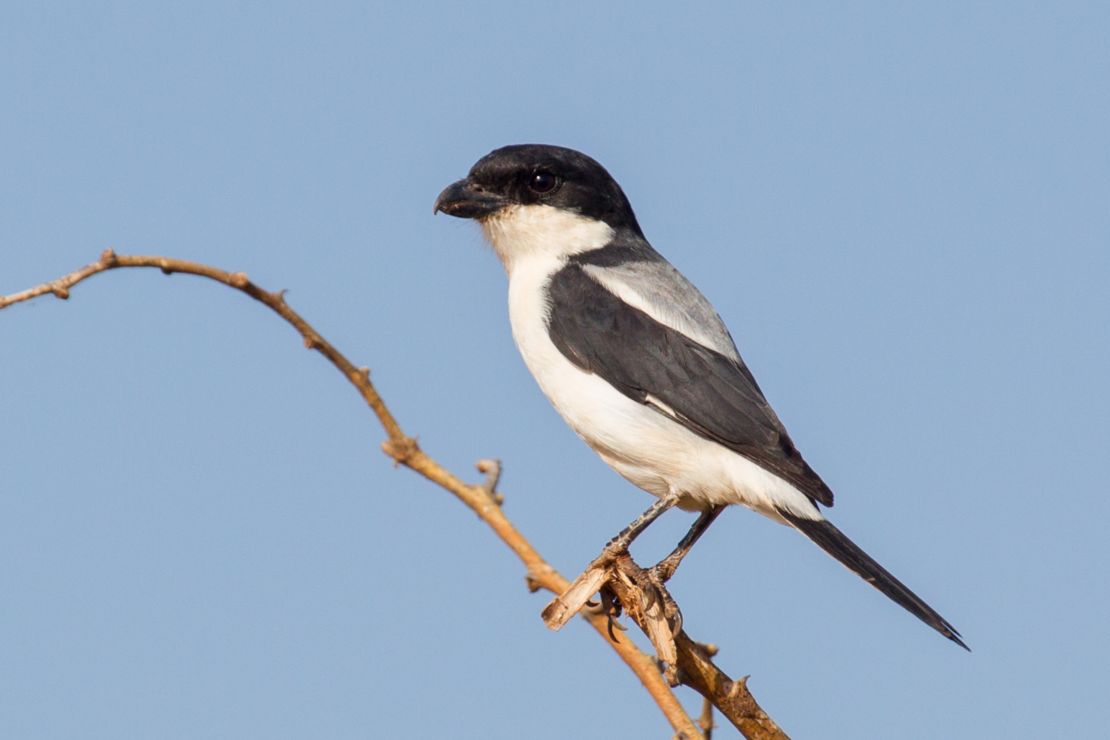 Taita Fiscal